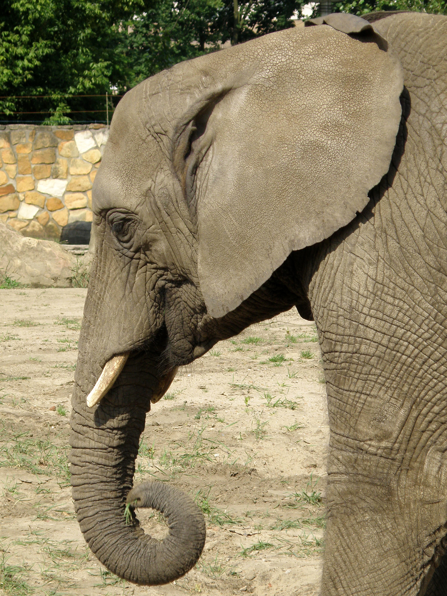 Warszawski Ogród Zoologiczny - słoń afrykański (Loxodonta africana)